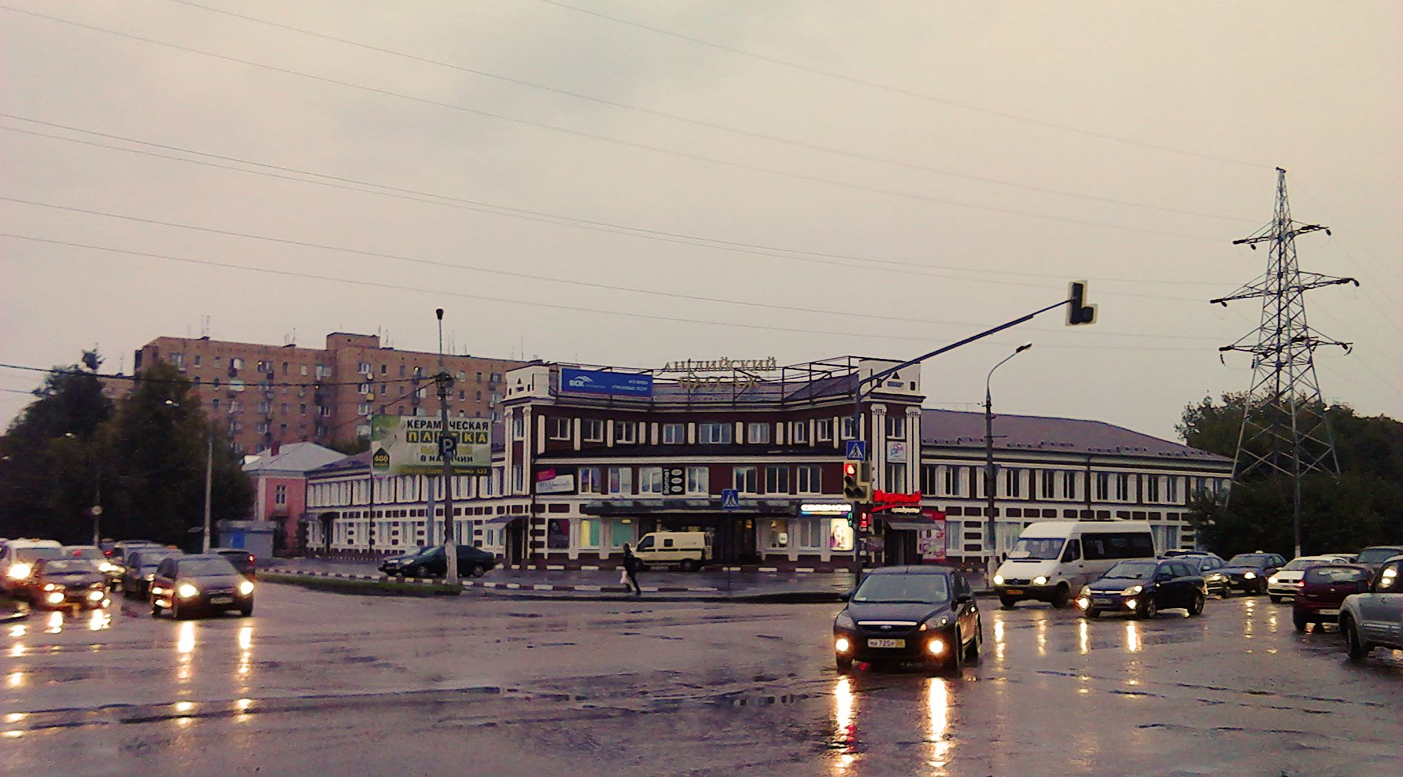 ТЦ "Английский Пассаж" г. Орехово-Зуево, август 2013